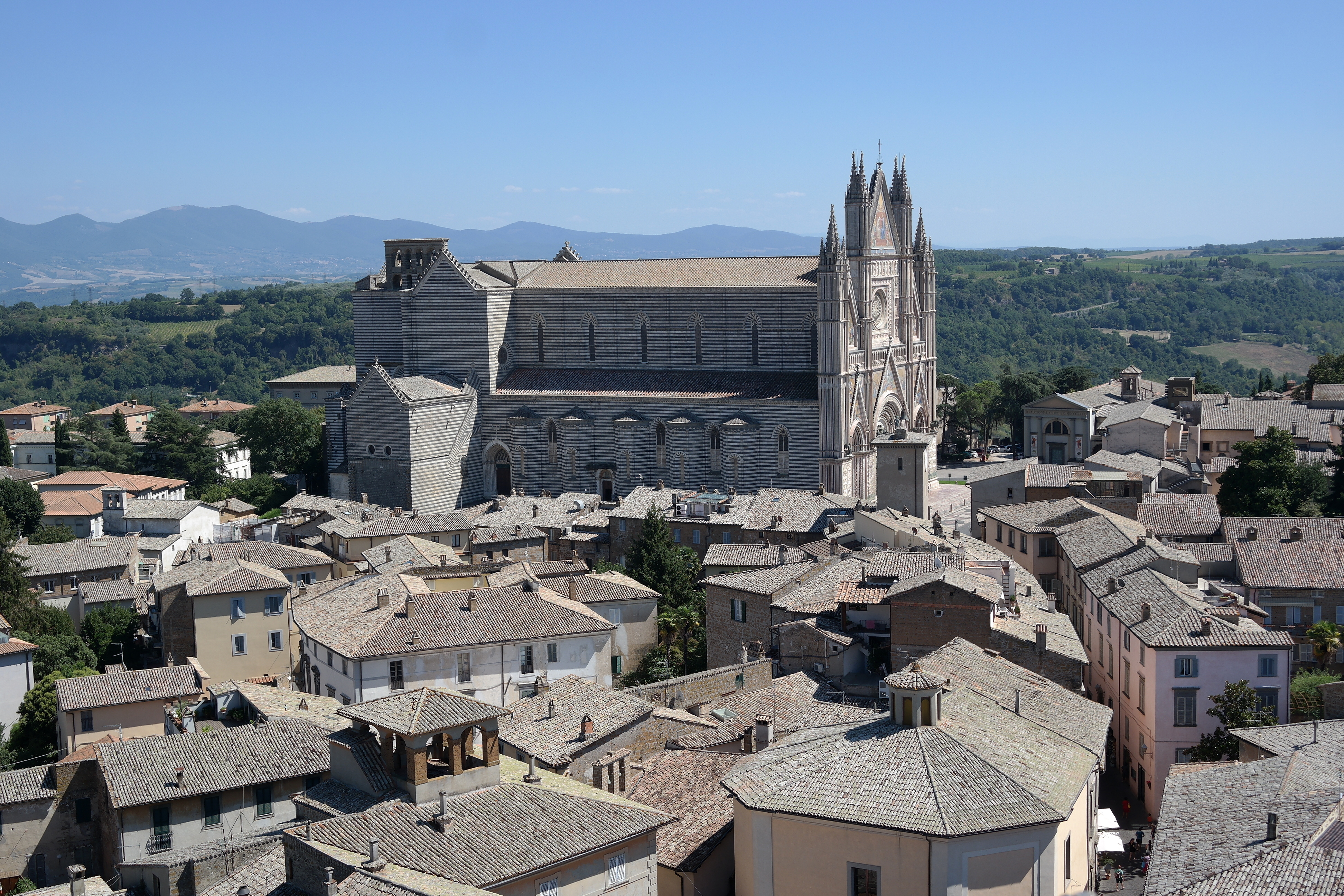 Veduta del Duomo di Orvieto dalla Torre del Moro